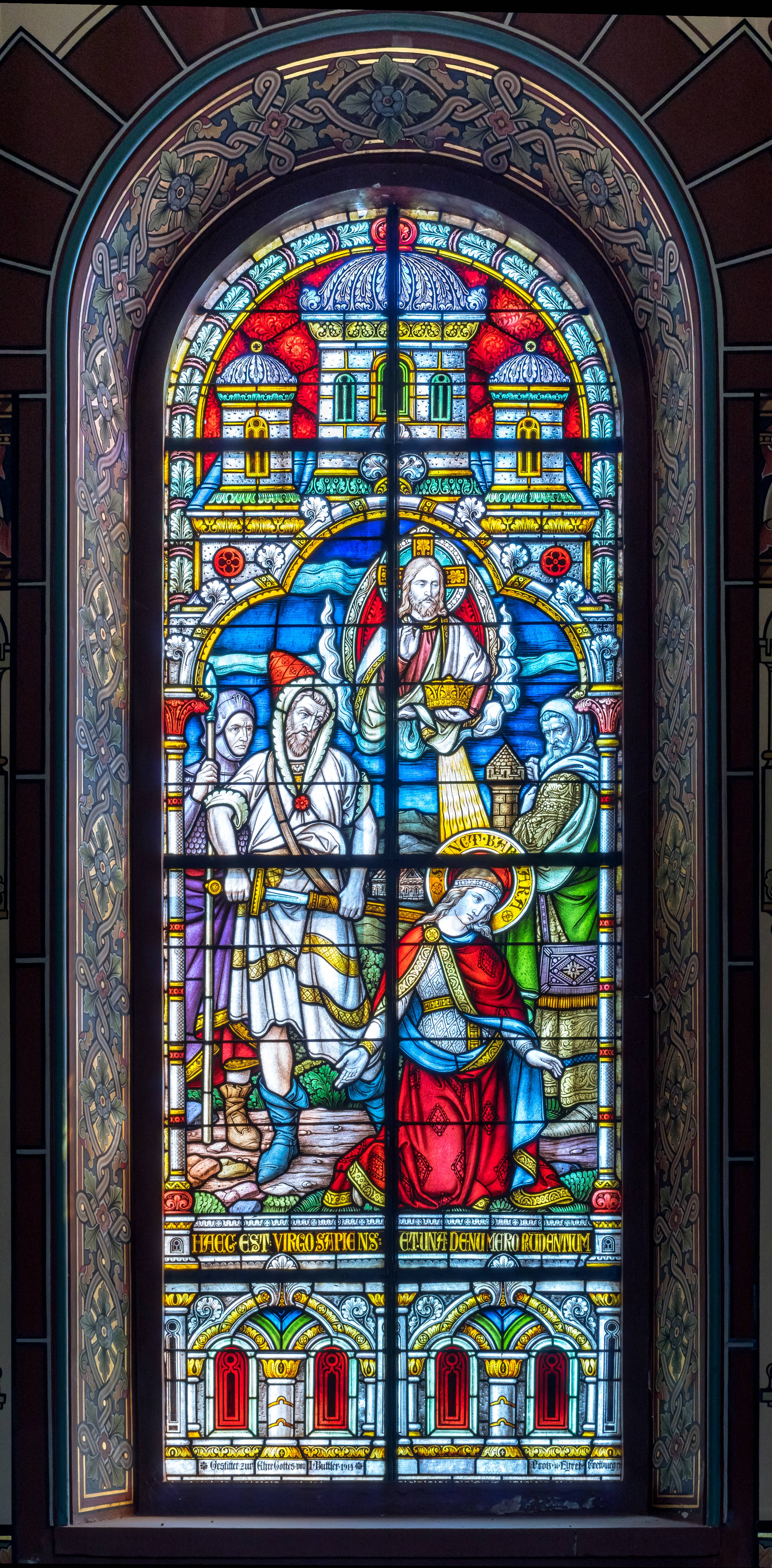 Glasfenster im Langhaus in der Kirche St. Peter und Paul in Bonndorf Motiv: Enthauptung der heiligen Barbara durch ihren Vater Inschrift HAEC EST VIRGO SAPIENS ET UNA DE NUMERO PRUDENTIUM Gestiftet zur Ehre Gottes von I. Buttler 1914